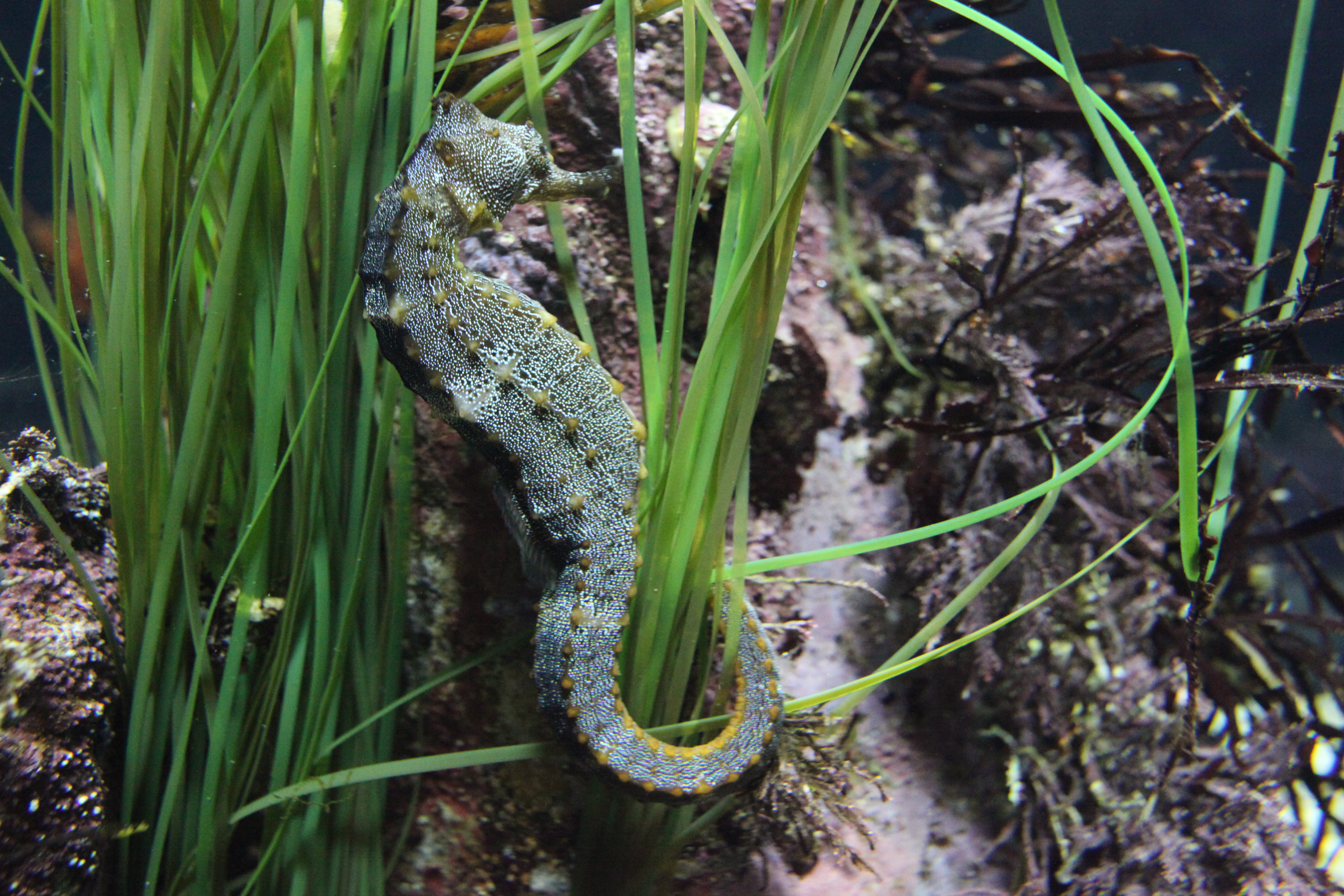 Hippocampus ingens, Monterey, California, Estados Unidos